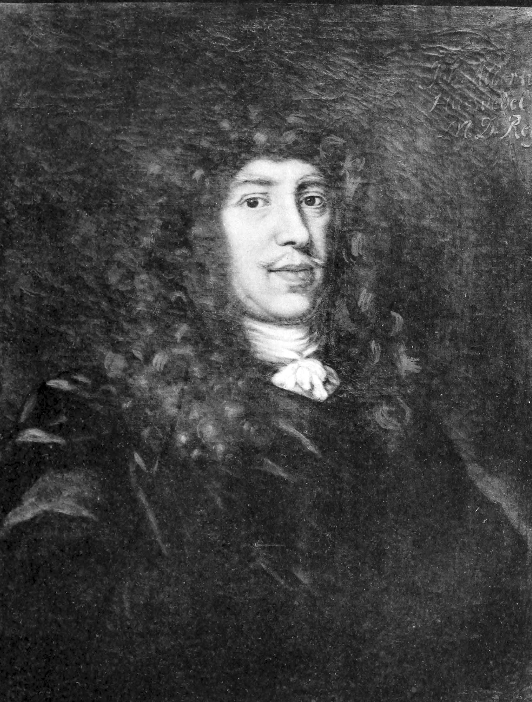 Johann Albert Huswedel (1618-1674). Något äldre man, bröstbild, fas t. v., med mörka bruna ögon, små mörka gråsprängda, framtill underrakade mustascher, stor rödbrun allongeperuk öfver axlarna. Hvit lindad halsduk hopknuten framtill, de nedhängande ändarna instuckna, draperad i svart kappa. Mörk bakgrund, uppe t. v. står Joh: Albertus Huswedel M. D. Reg. Olja på duk, 7572 X 6072 ctm., Medicinalstyrelsen. Eich. o 12. PI. VIII. — I Collegii Medici kassabok 1704—1761 finns följande post införd 1707 2/io: Åt H:r Hannibal för sahl. D:r Huswedels och sahl. D. Friderici portraiter — 60 dir kmt.